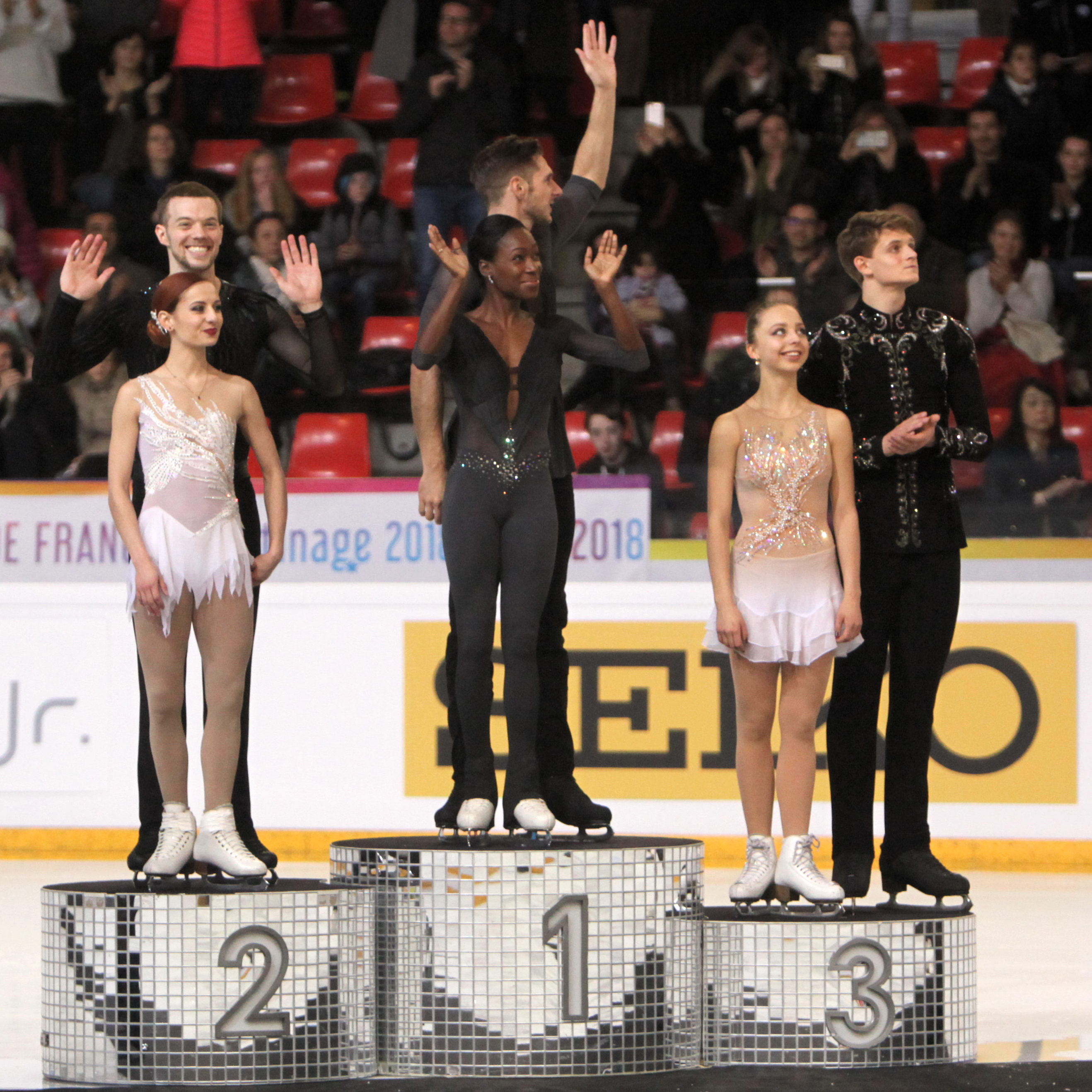 Internationaux de France de Patinage 2018, Pairs.